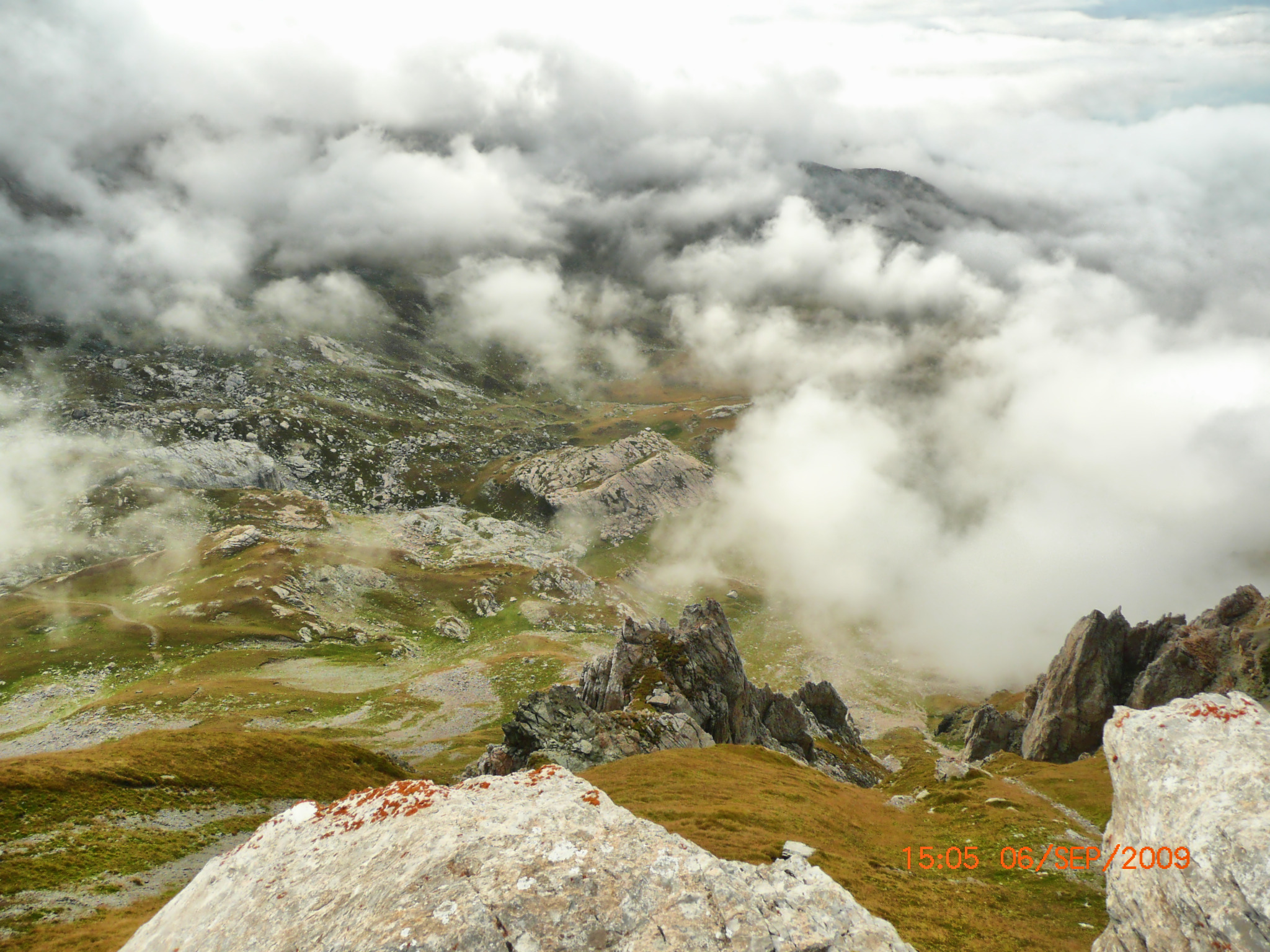 Поглед кон Кораб, Македонија.